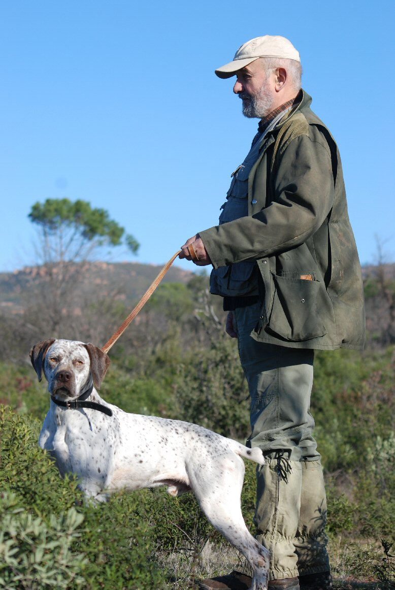 Michel Comte, recréateur de la race, avec son braque du Bourbonnais en 2008